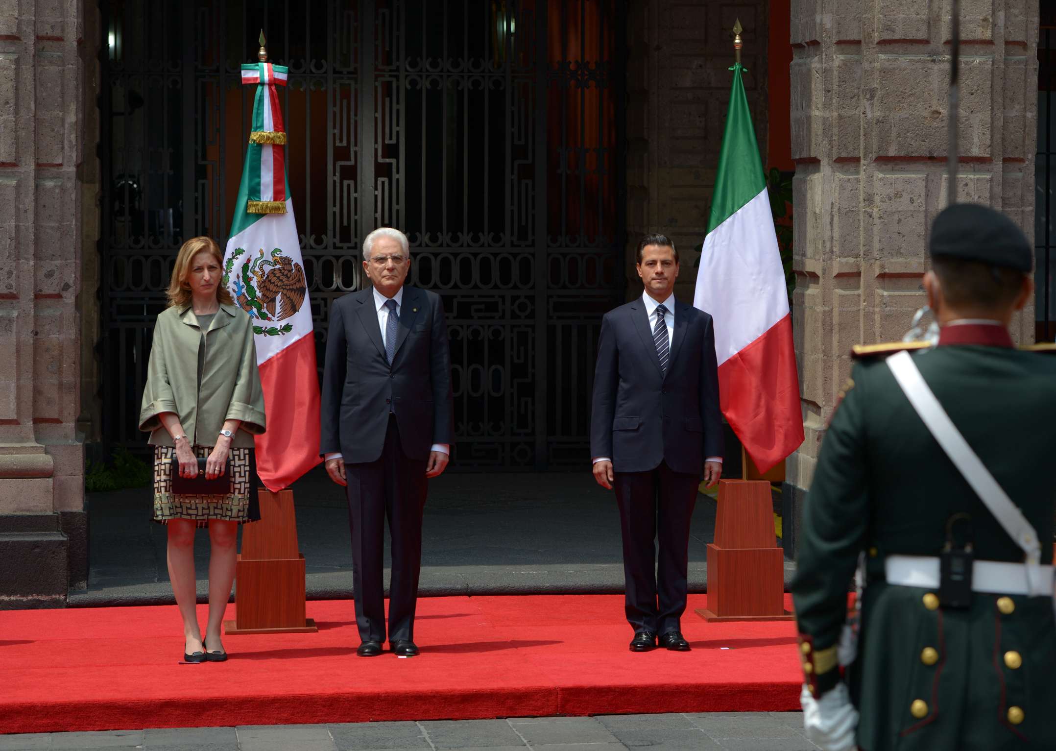 Sergio Mattarella en Mexico